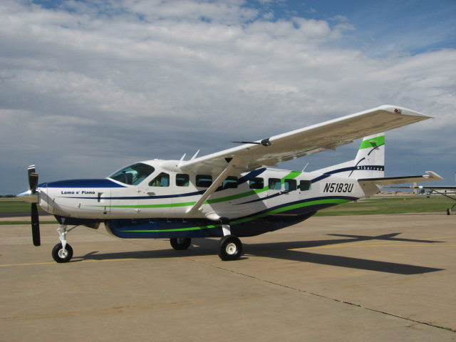 Caravan de Albatros Airlines en la fáfrica de Cessna en Wichita